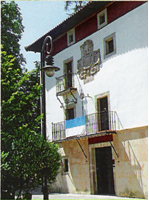 Vista parcial de la casa consistorial del Ayuntamiento de Zalla (Vizcaya)